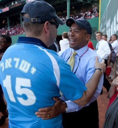 נדב תמיר עם מושל מדנית מסצ'וסטס, דבאל פטריק